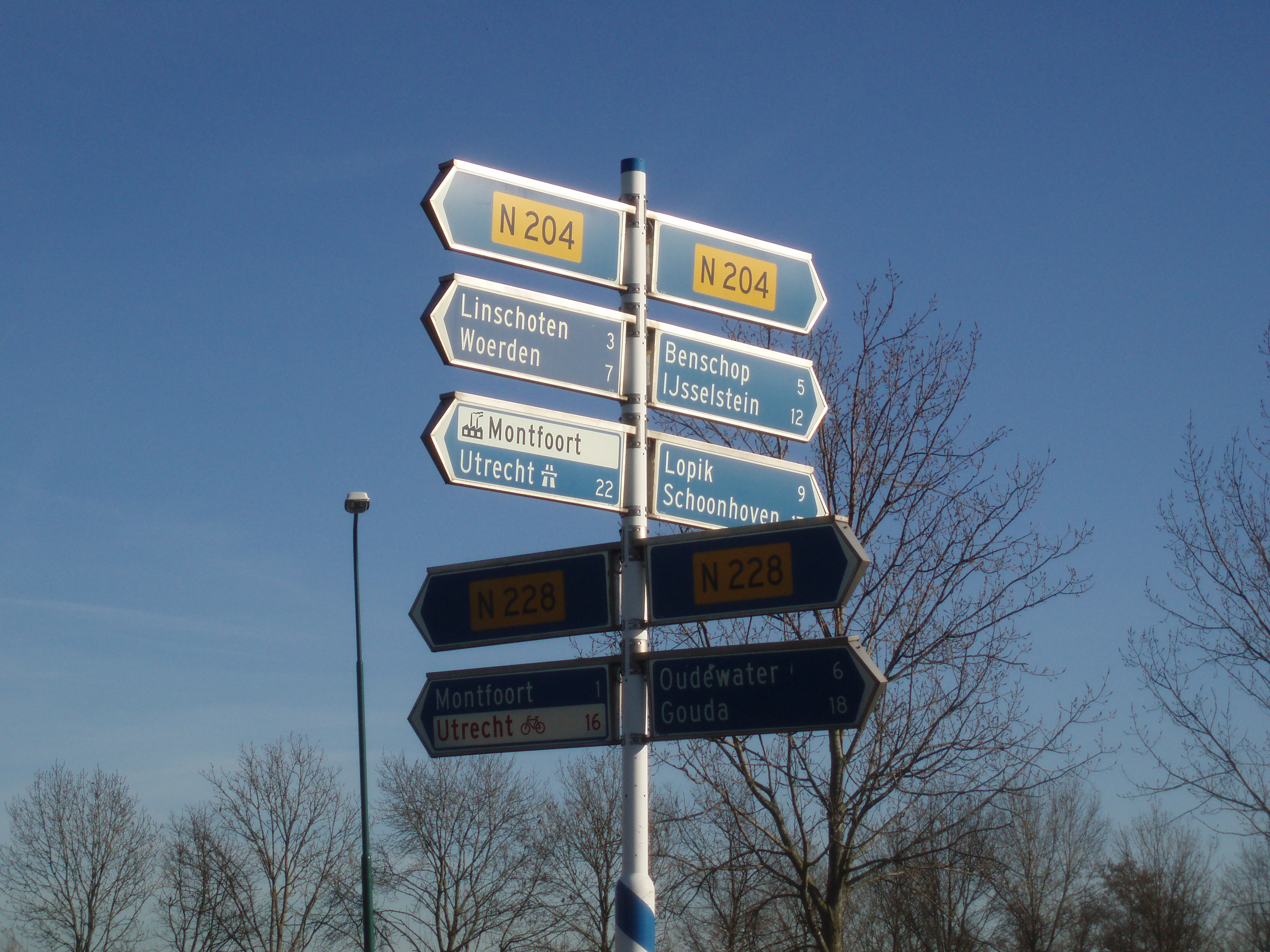 Kruising van de N228 en de N204 in Willeskop.